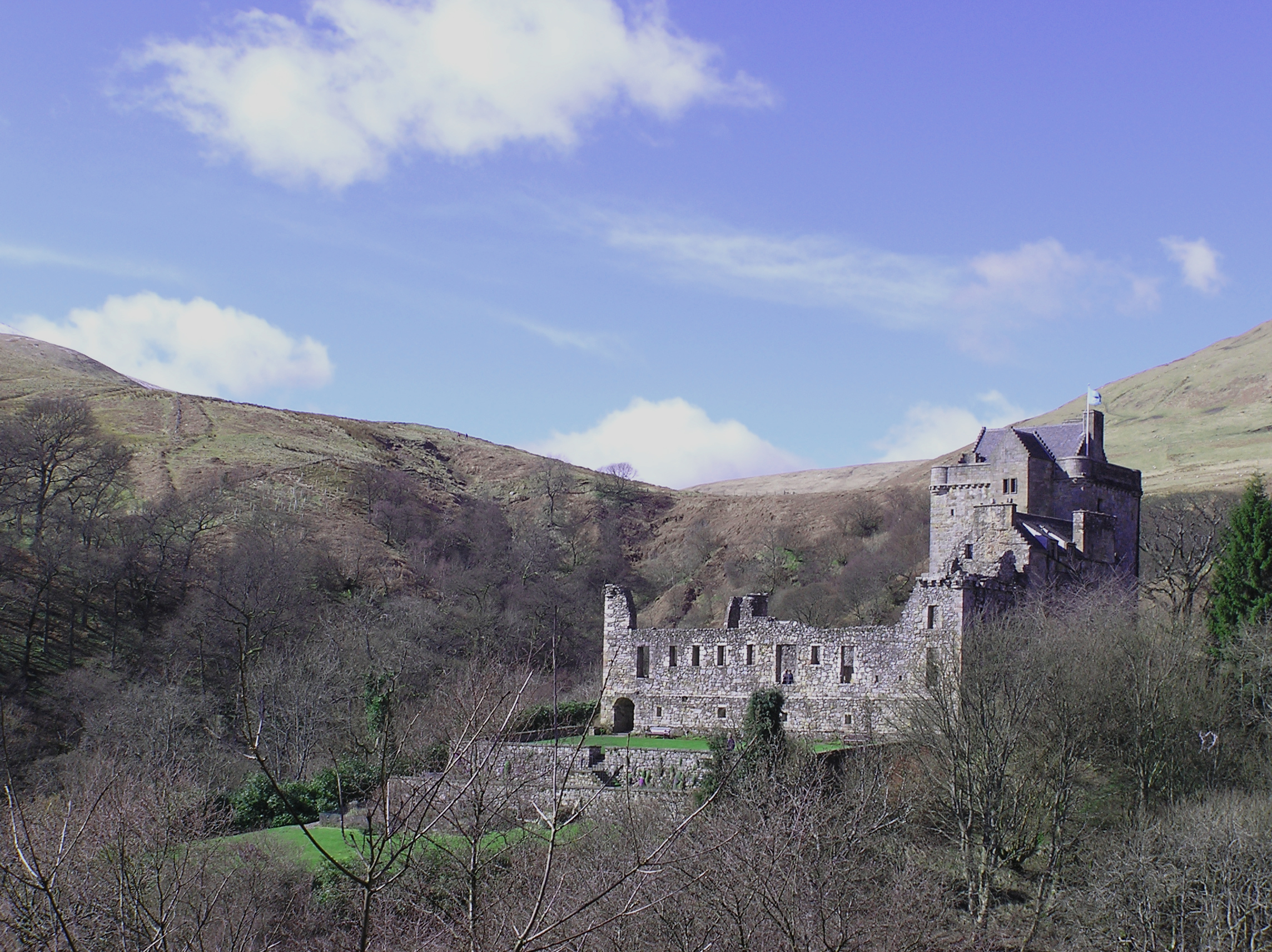 Castle Campbell 4